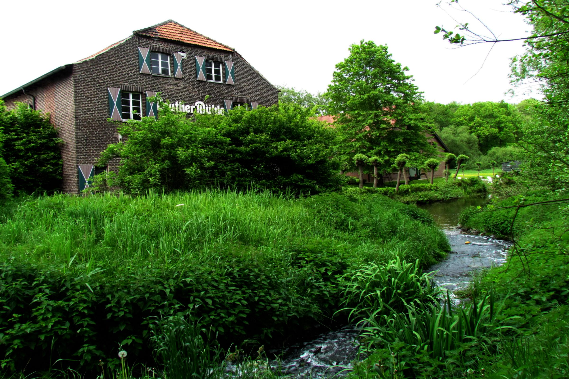 Die Leuther Mühle an der Nette